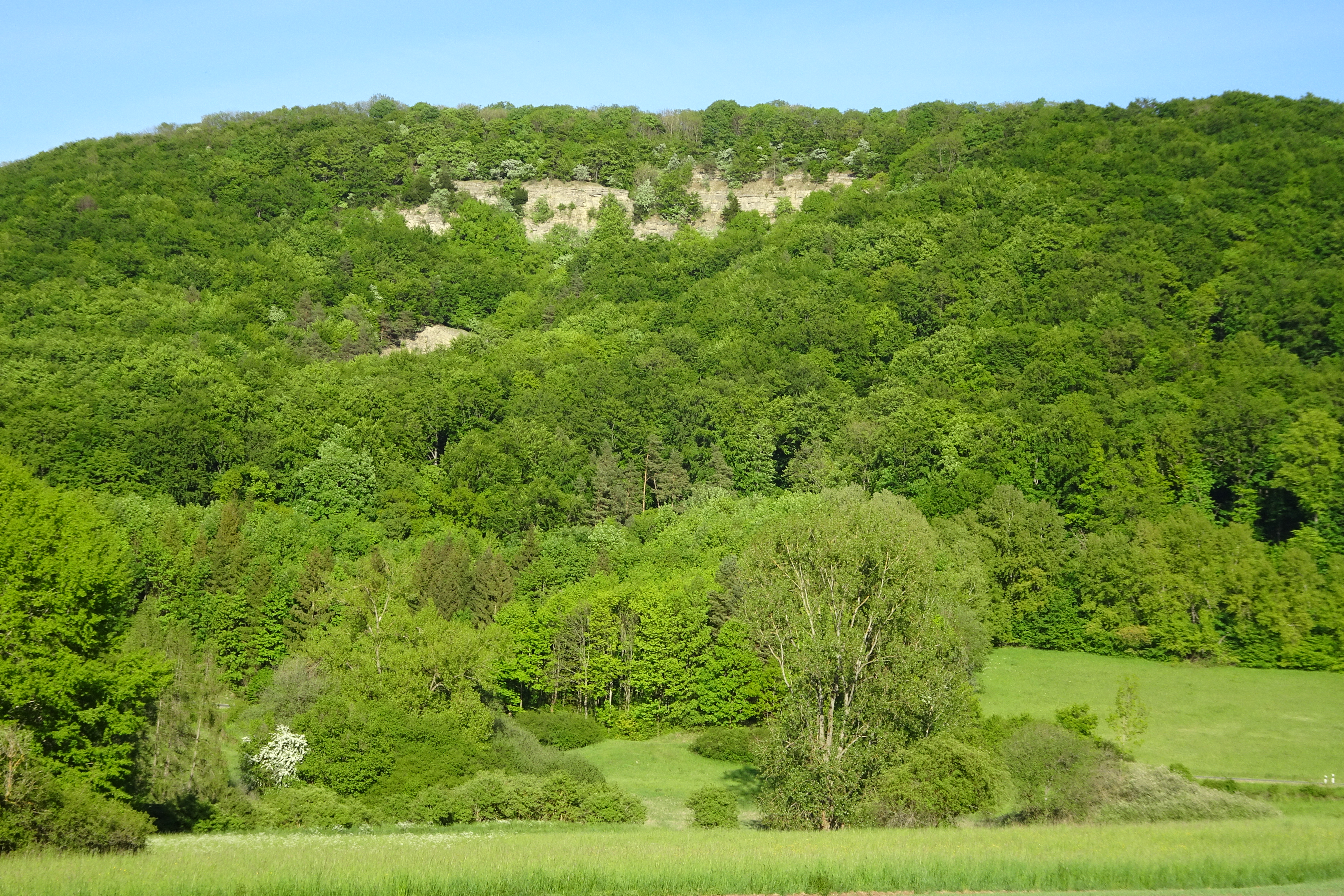 Die Graburg im nordhessischen Ringgau ist ein Bergstock aus Muschelkalk, der über einem Sockel aus Oberem Buntsandstein, der Röt genannt wird, liegt. Naturnahe Kalkbuchenwälder, Felsen und Bergstürze prägen das Gebiet in besonderer Weise. Wegen ihrer landschaftlichen Schönheit und Eigenart sowie ihrer Bedeutung als Lebensraum für seltene und bestandsgefährdete Tier- und Pflanzenarten wurde die Graburg in dem Jahr 1915 als Naturdenkmal und ab Mai 1965 als Naturschutzgebiet unter besonderen Schutz gestellt. Als Wuchsort seltener Pflanzengesellschaften und aufgrund ihres außergewöhnlichen floristischen Reichtums wird die Graburg zu den bedeutendsten Naturschutzgebieten in Hessen gezählt. Die hier vorhandenen zahlreichen Vegetationseinheiten, die in großer Vielfalt und einer charakteristischen Abfolge vorkommen, gelten als wertvoll für Forschung und Lehre. Als besonders schutzwürdig werden auch die orchideenreichen Kalkmagerrasen, der hessenweit größte Eibenbestand, die großen Bergstürze mit ihren Blaugrashalden sowie die zahlreichen Höhlen in den Felsbereichen als Winterquartiere für gefährdete Fledermausarten angesehen.